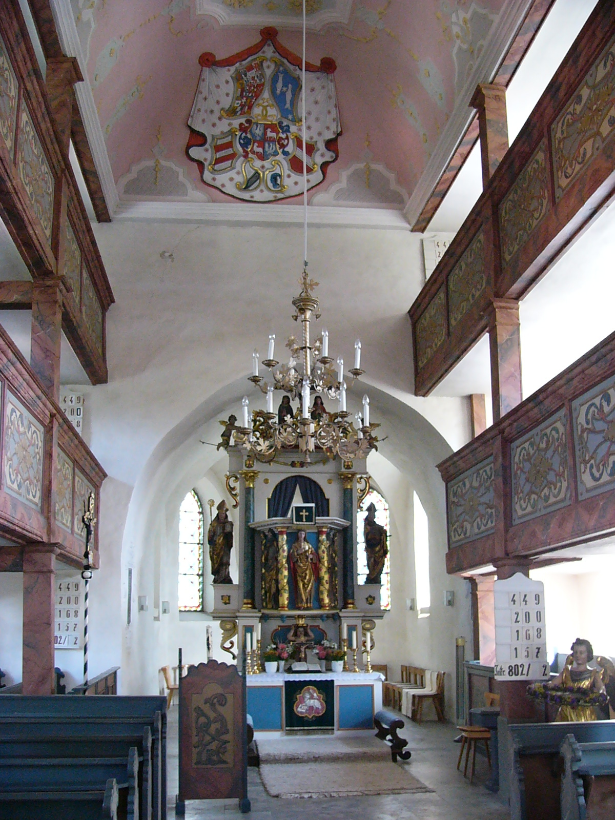 Inneres der Kautendorfer Kirche